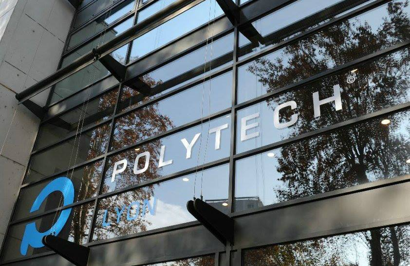 A l'entrée principale de Polytech Lyon.